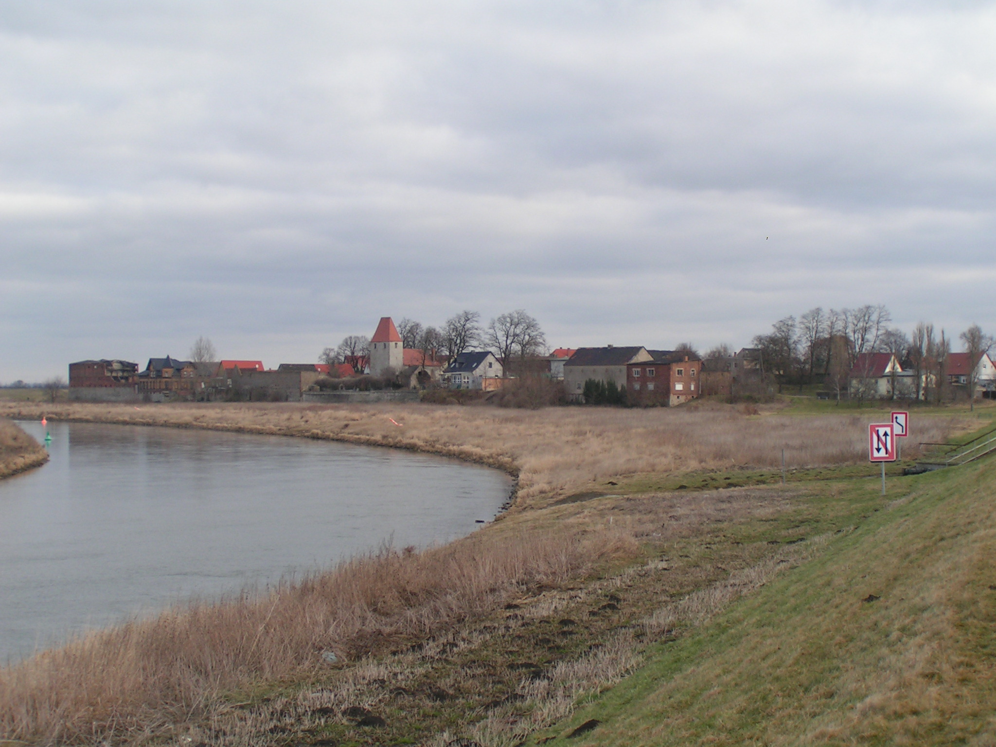 Blick auf Trabitz, Stadt Calbe (Saale), Deutschland